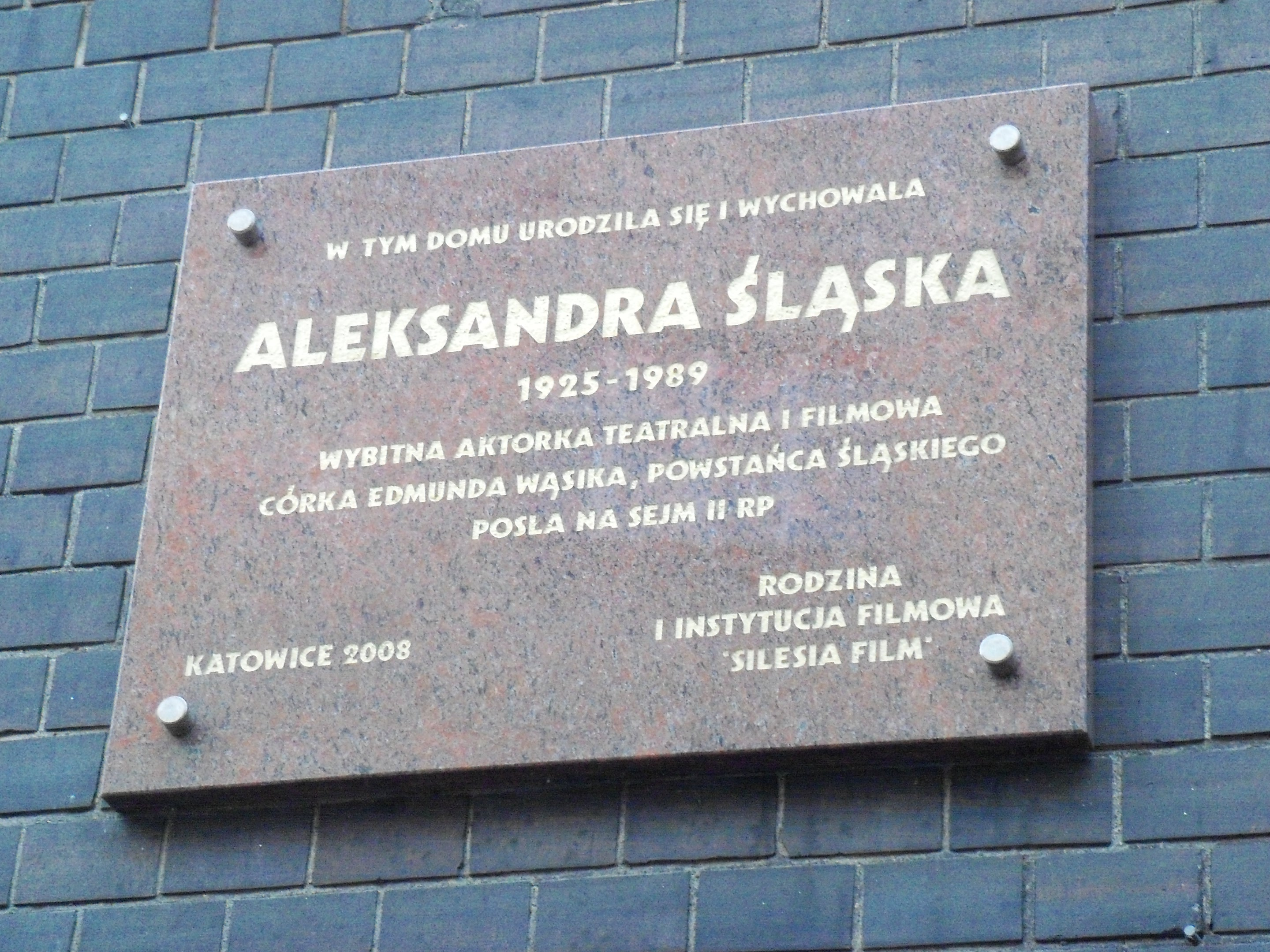 Tablica poświęcona Aleksandrze Śląskiej, umieszczona na fasadzie kamienicy na rogu ul. Kościuszki i ul. Poniatowskiego w Katowicach